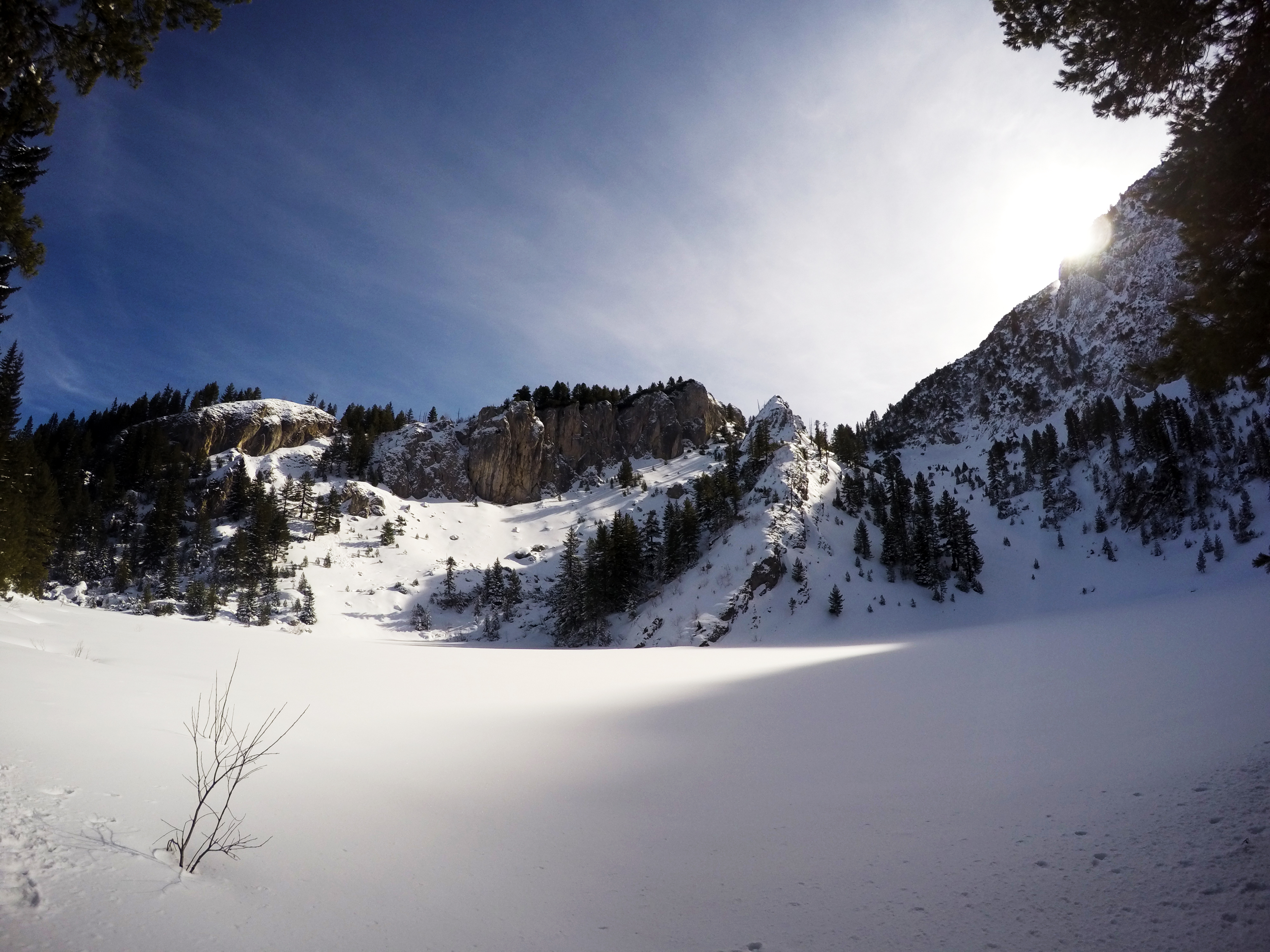 Parku Kombëtar Bjeshkët Nemuna, Pejë, Deçan, Istog, Junik, Gjakovë